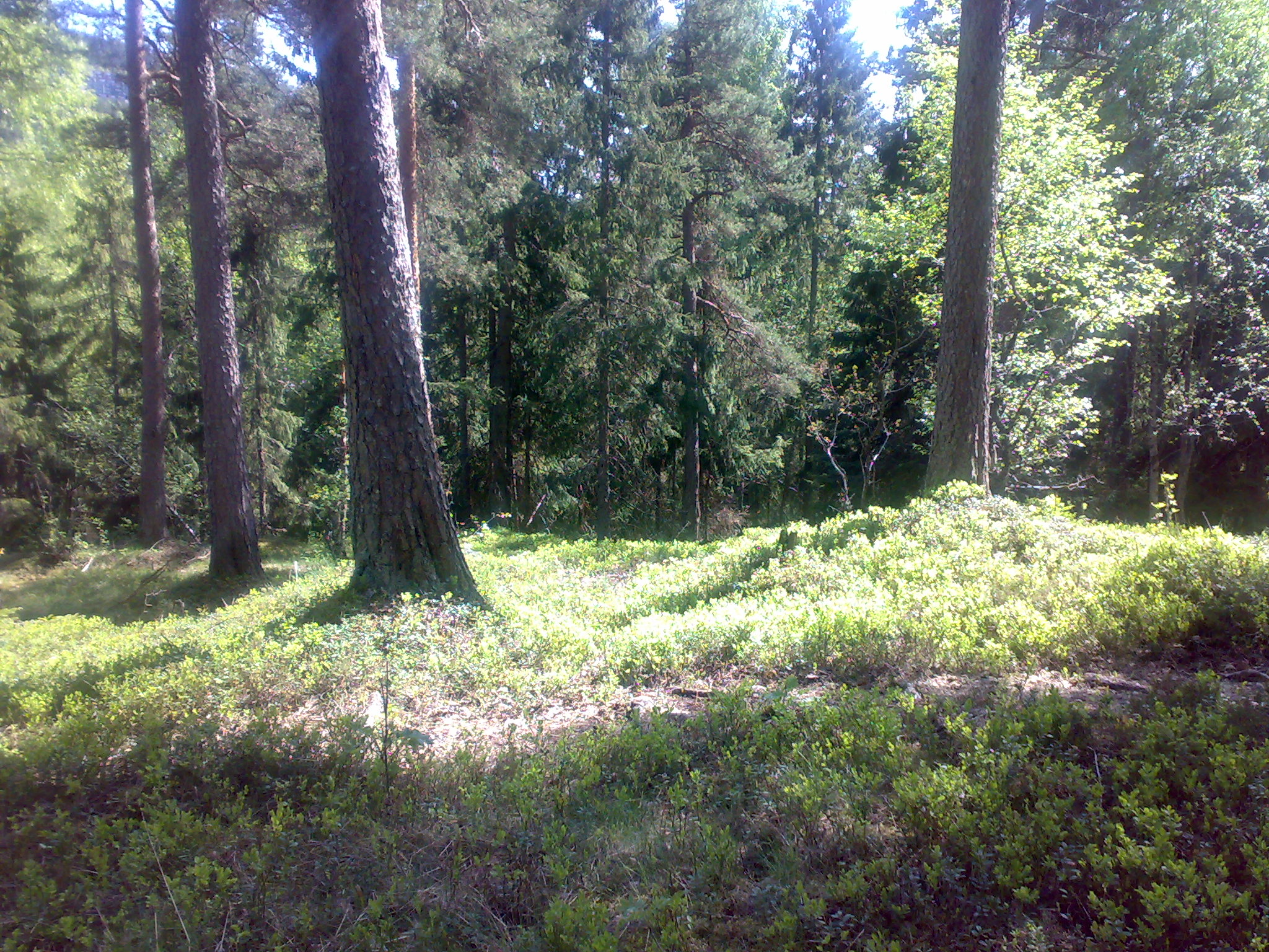 Furuskog Pine-woods Oslo Norway